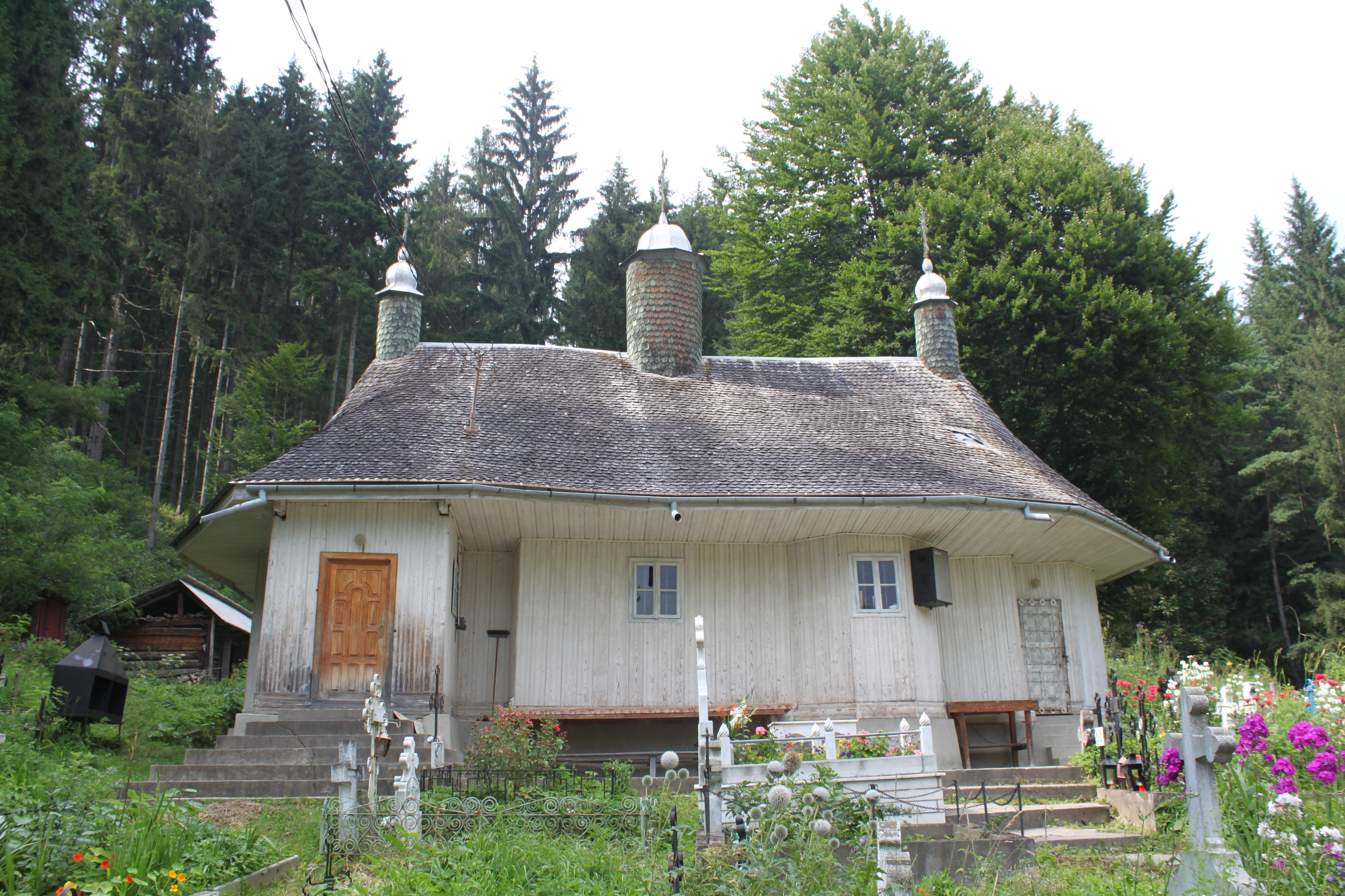 Biserica de lemn Buna Vestire din Poiana Largului, judeţul Neamţ.